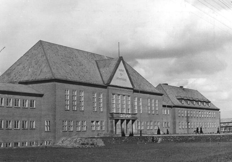 Güstrow, Institut für Lehrerbildung Zentralbild Pietsch 6.6.52 Institut für Lehrerbildung in Güstrow-Mecklenburg Um unsere Kinder zu allseitig gebildeten Menschen zu erziehen, brauchen wir viele gutausgebildete Lehrkräfte und Bildungsstätten, in denen sich die zukünftigen Lehrer, unter Anleitung erfahrener Fachkräfte, auf ihre kommende Tätigkeit vorbereiten können. Das Institut für Lehrerbildung in Güstrow wird erweitert und soll bis 1955 zur größten Bildungsstätte der DDR für 1200 Pädagogen ausgebaut werden. In dem bereits fertiggestellten Gebäude wurde der Unterricht schon aufgenommen. UBz: Das Institut für Lehrerbildung.